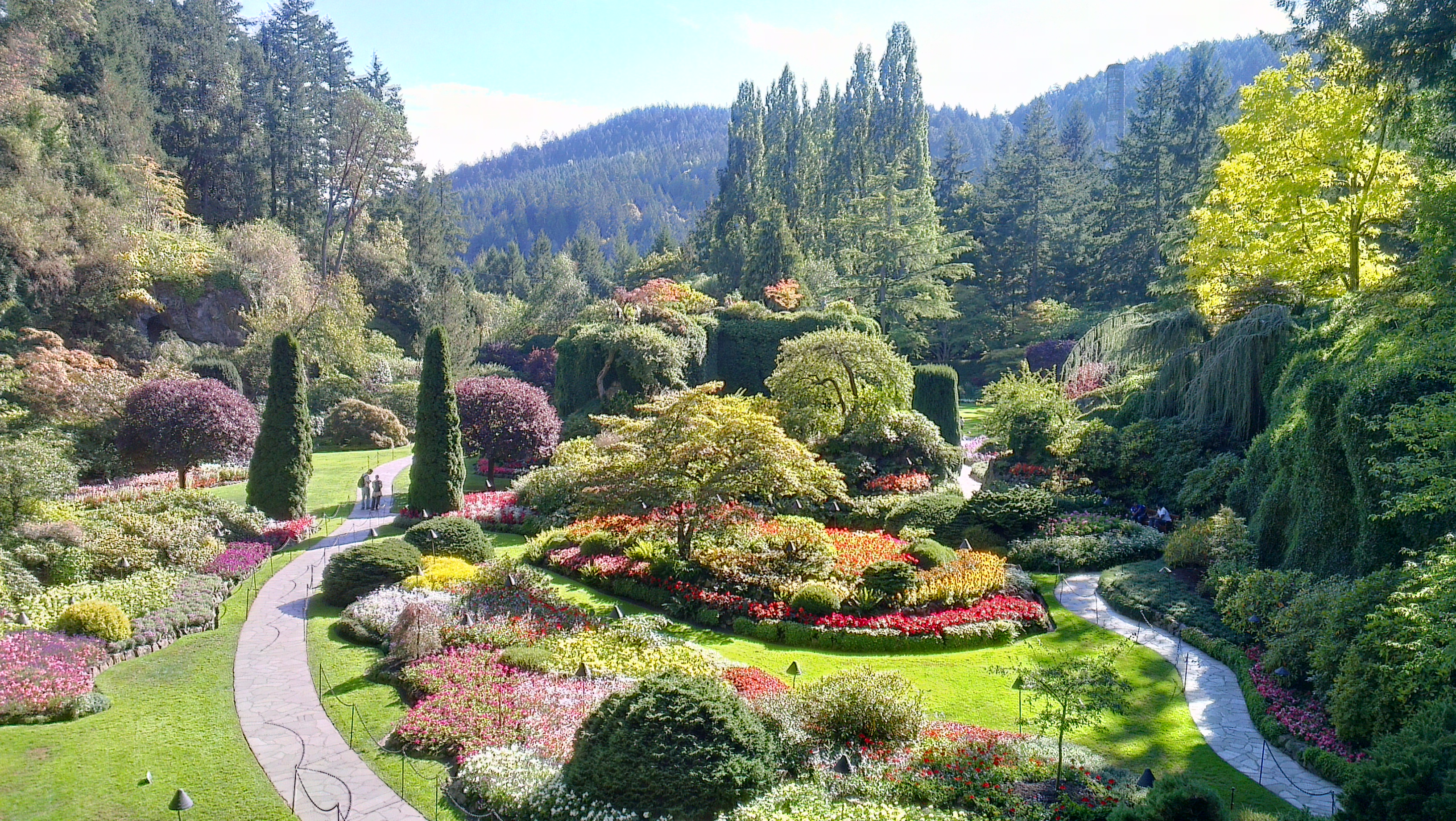 Lieu historique national du Canada des Jardins-Butchart